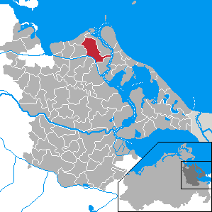 Rubenow, Landkreis Ostvorpommern, Mecklenburg-Vorpommern